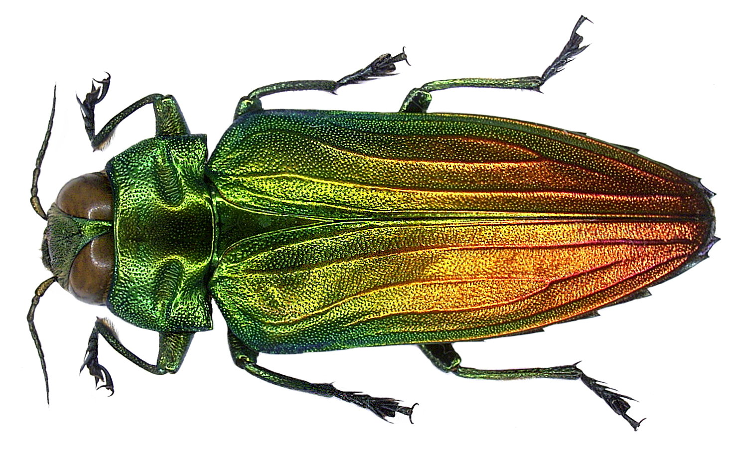 Familie: Buprestidae Groesse. 23 mm Fundort: Indonesien, Molukken, Bacan, Labuha leg. A.Skale, 2006; det. Niehuis Photo: U.Schmidt, 2006